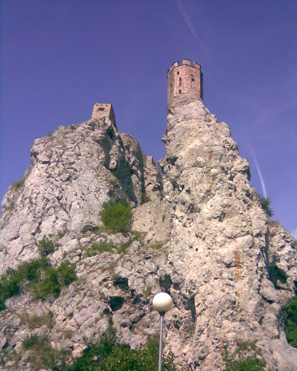 Veža a hrad hradu Devín